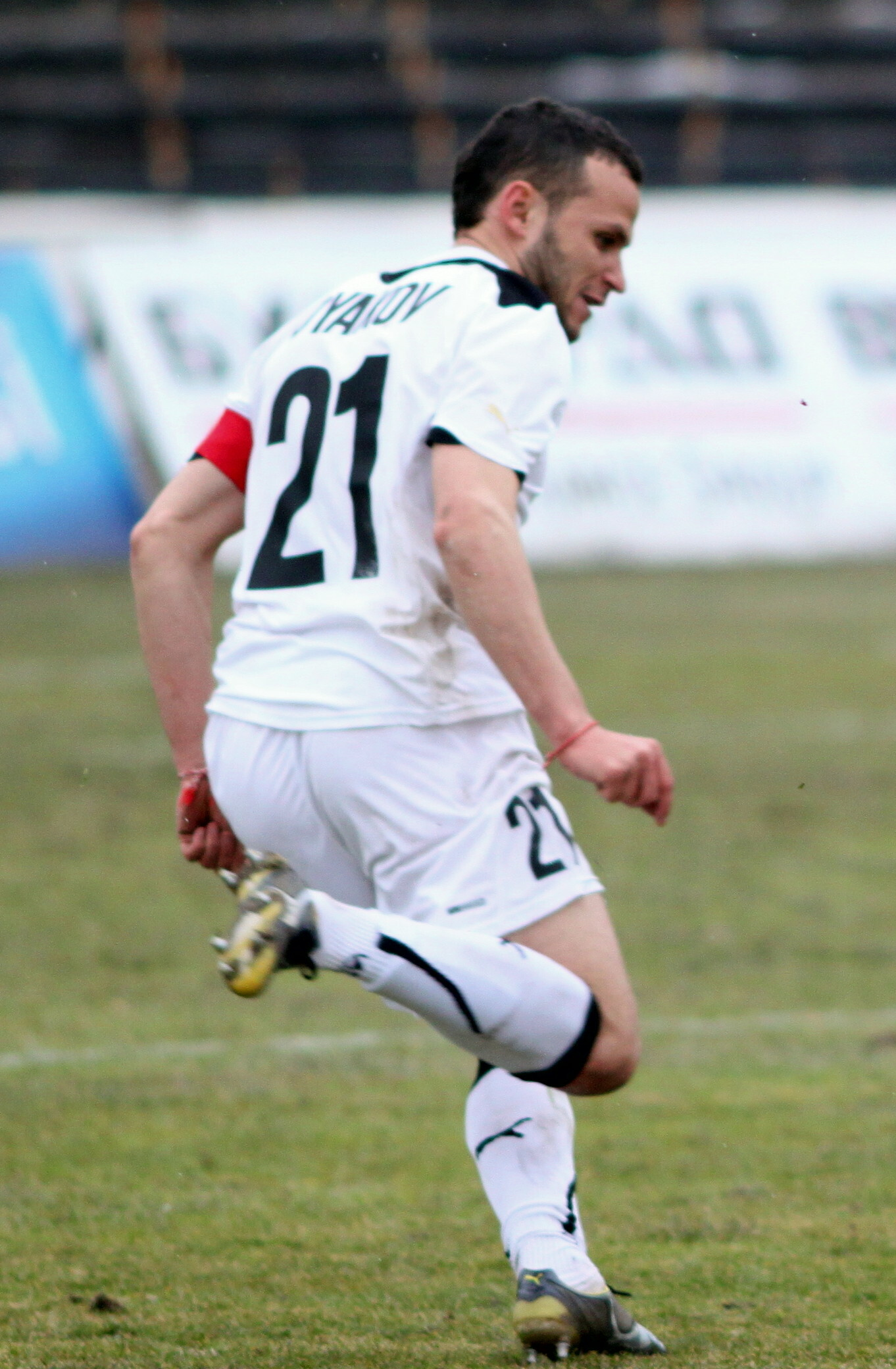 Богомил Дяков - български футболист, състезател на Славия (София)